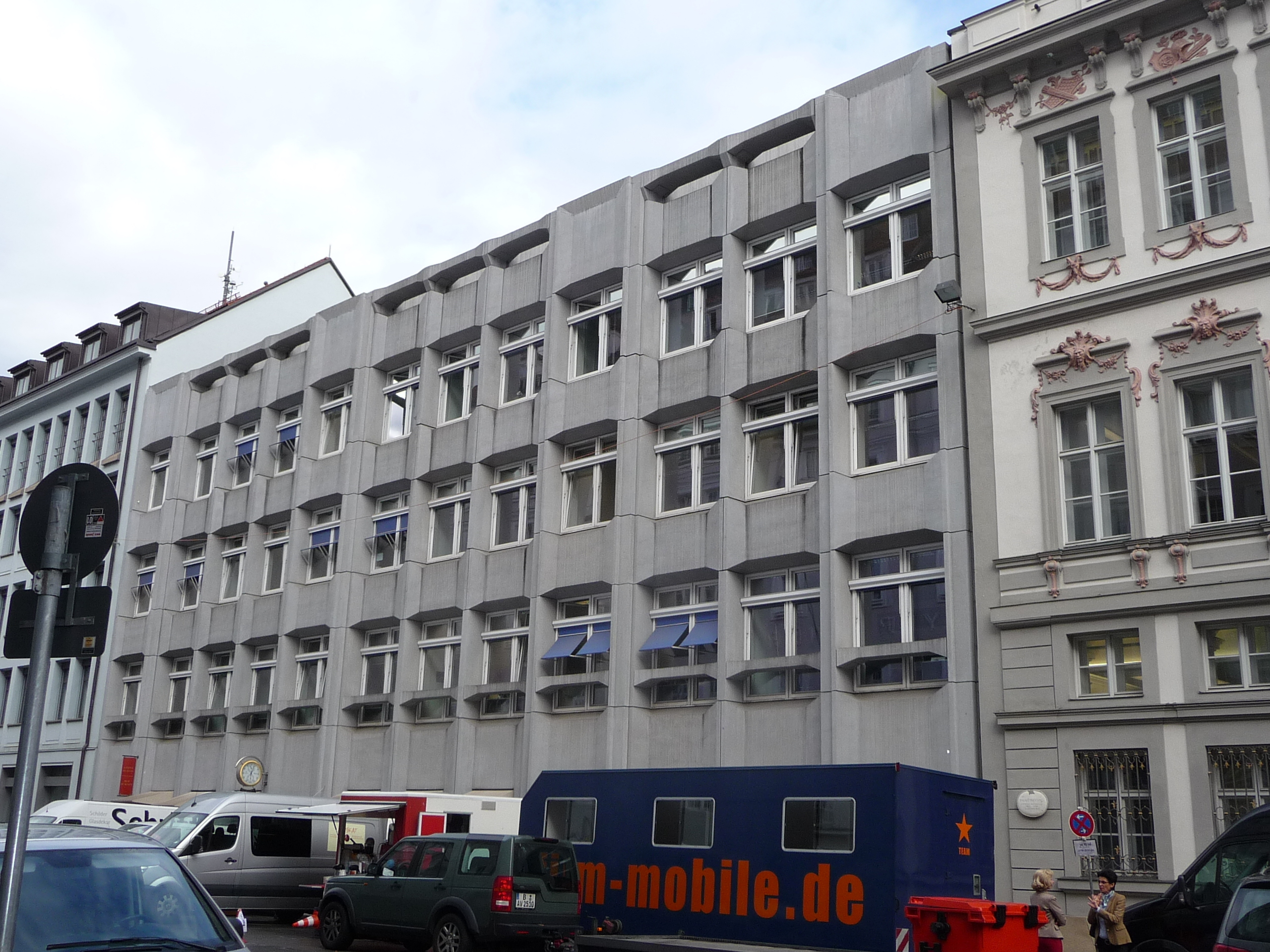 Internationale Architektenteams planen derzeit diesen Nachfolgebau des "Hiltl-Hauses" (Prannerstraße 4) aus den 1970-er Jahren erneut zu ersetzen.